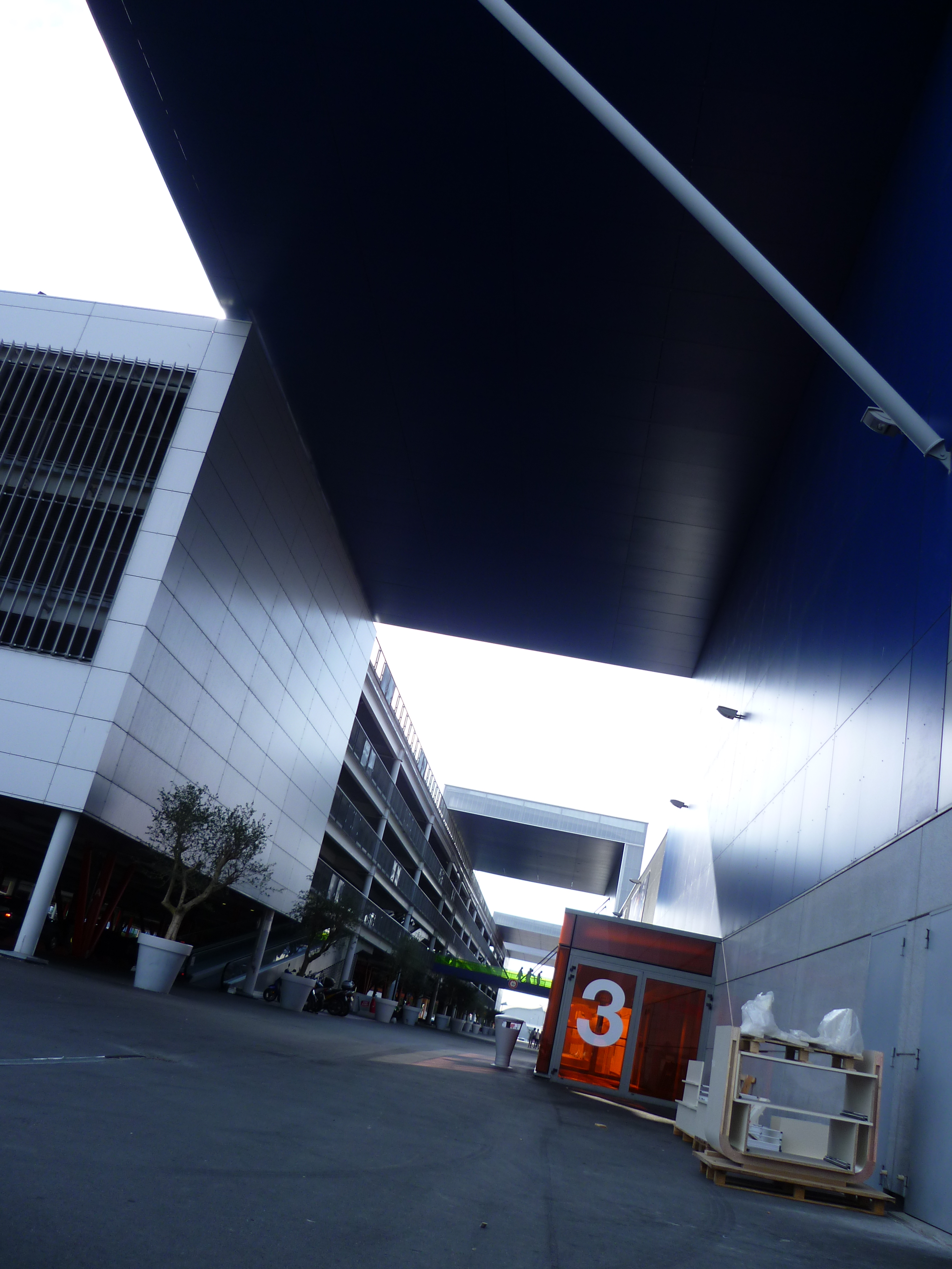 Le Centre commercial de Blagnac, Haute-Garonne.